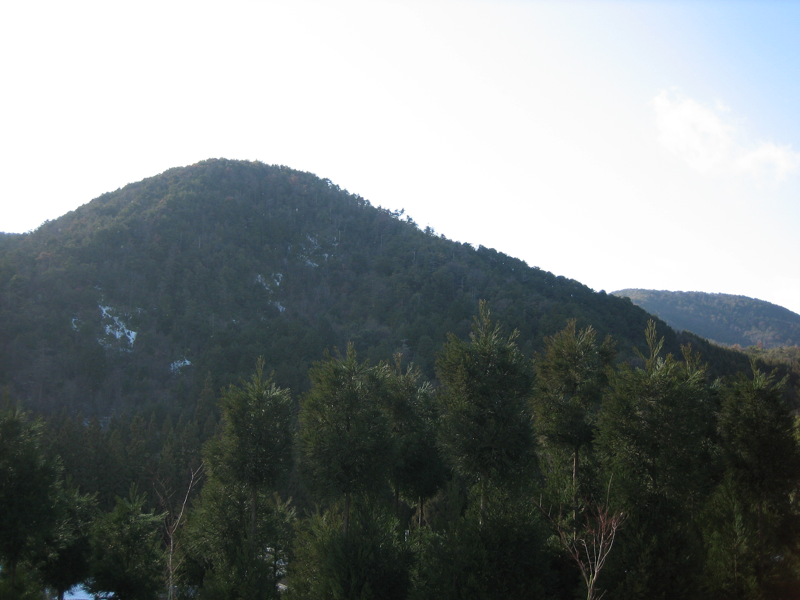 鷹峯丘陵を京都市北区鷹峯土天井町から撮影